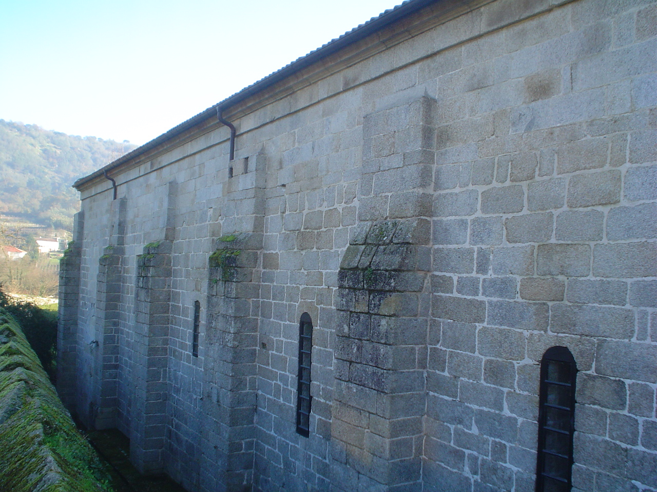 exterior da nave do templo do mosteiro de San Clodio (Leiro)